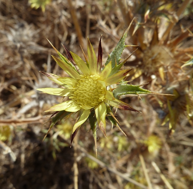 Carlina racemosa (Cardo de uvas): Capítulo en floración - Rambla del Labradorcico, Águilas (Murcia, España).